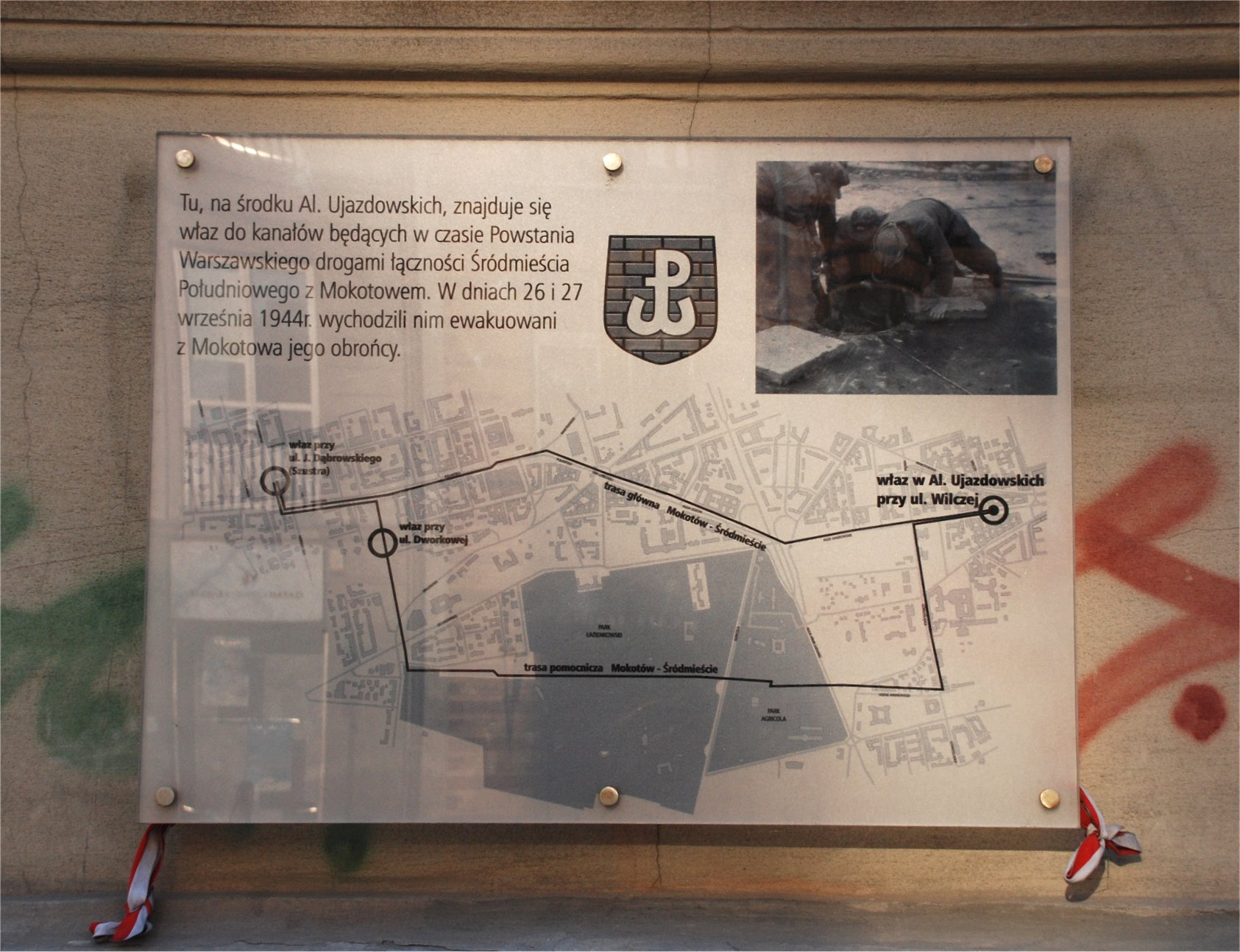 Przy al. Ujazdowskich w Warszawie (fot Zu)